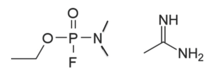 Химические структуры близкие к "Новичкам". Левая формула: Ethyl dimetilphorsphoramidofluoridate, правая - acetamidine